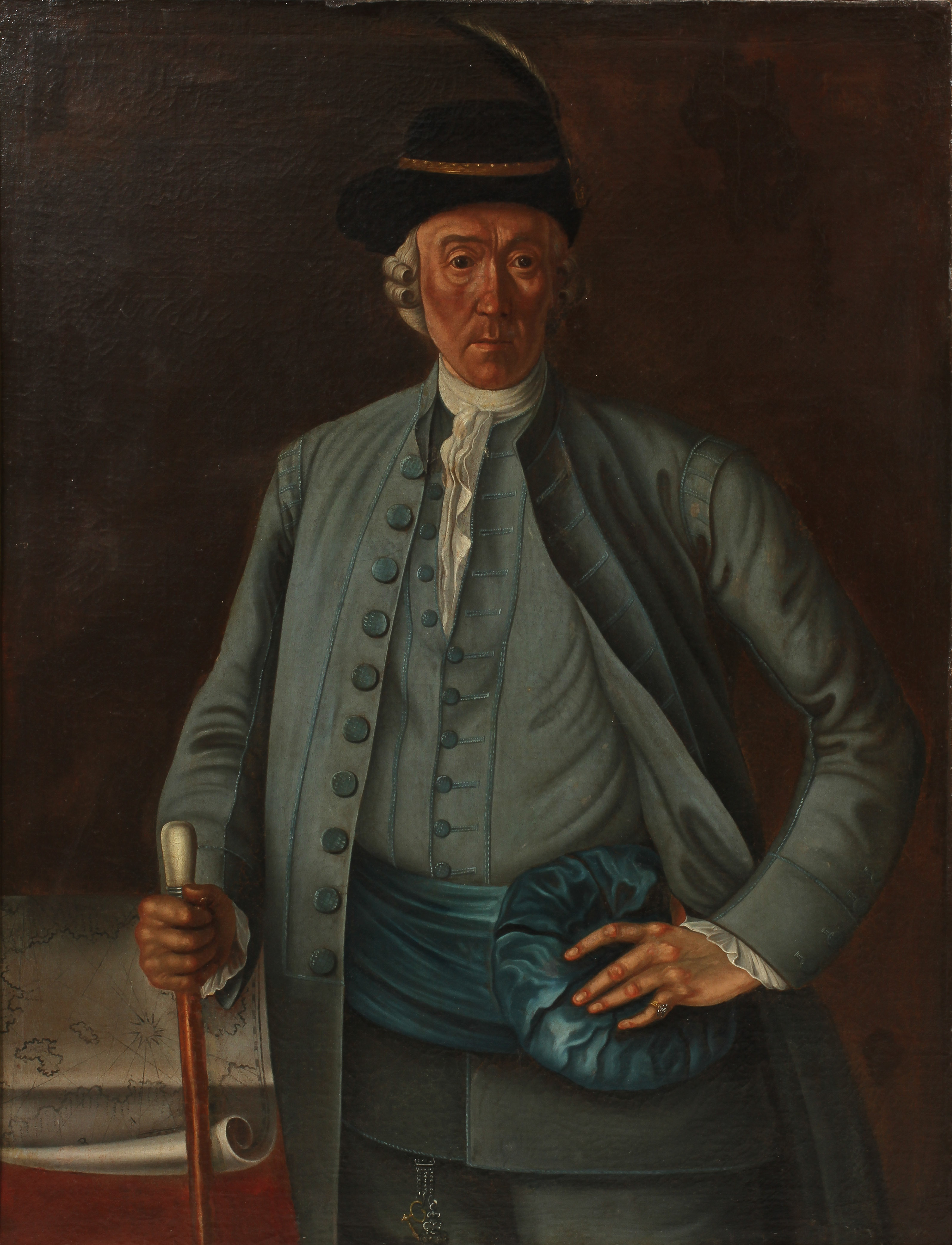 Johan Acrel, även stavat Acrell (1713-1790), på porträttet iförd den borgerliga versionen av nationella dräkten, var skeppsbyggmästare vid amiralitetet. Han var känd för byggandet av flertalet av svenska flottans galärer, bland andra Serafimsorden och Wrede II. Johan Acrel var far till Johan Gustaf Acrel, känd som den svenska kirurgins fader.